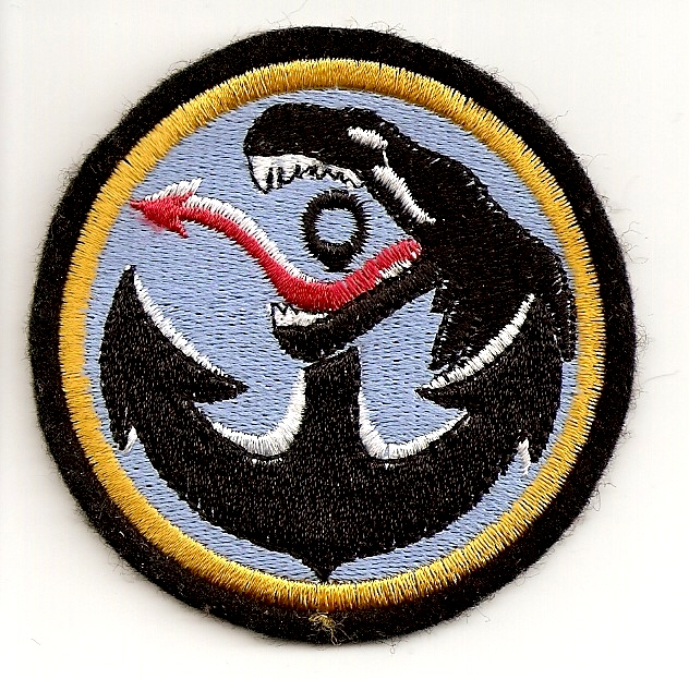 Naszywka Morskiej Jednostki Działań Specjalnych Formoza na mundur galowy